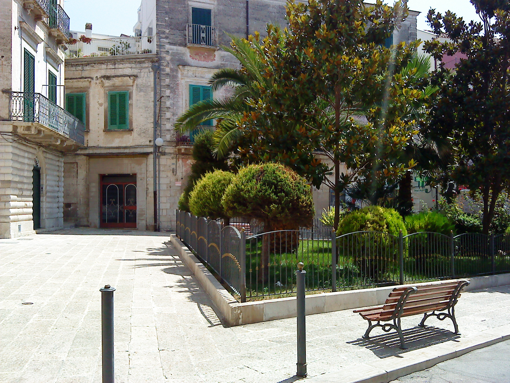 MICHELE_GR.